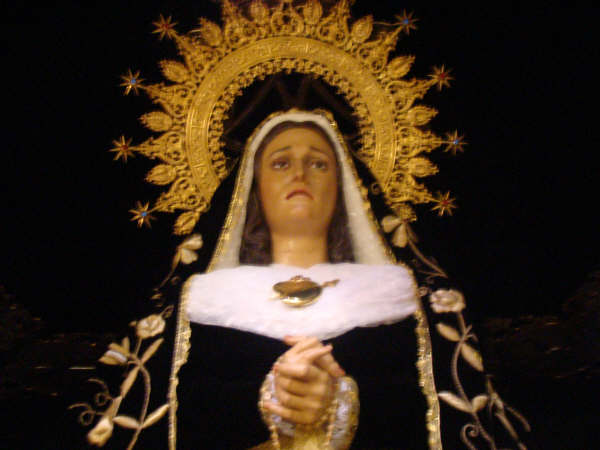 Nuestra Señora de la Soledad de San Agustín en la Procesión Camino del Calvario de Cuenca.